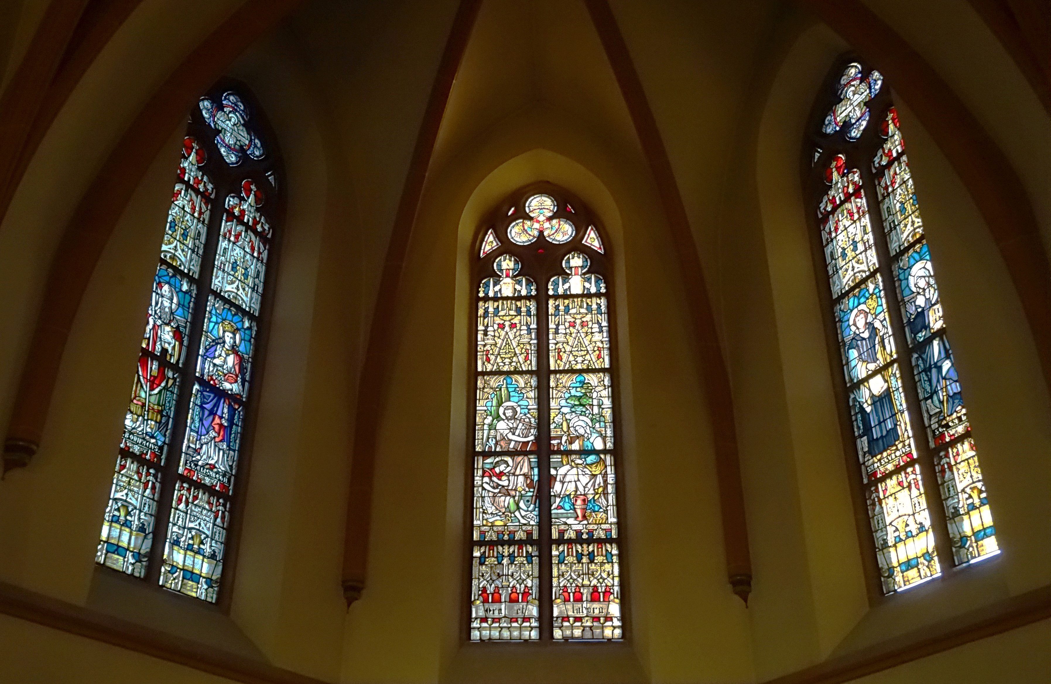 Bleiglasfenster im Chor der Pfarrkirche St. Bonifatius Apolda. Links die Heiligen und Schutzpatrone der Kirche, Bonifatius und Elisabeth von Thüringen. In der Mitte die Heilige Familie: Joseph - Pflegevater Jesu als Zimmerer, der Jesus das Handwerk lehrt und Maria, die Mutter Jesu mit einer Spindel in der Hand. Rechts die Heiligen Sturmius und Lioba.